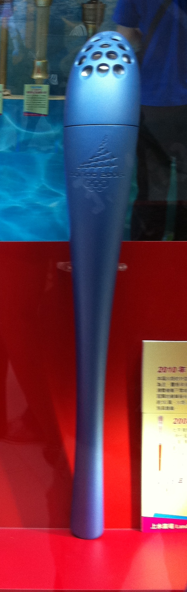 2006年冬季奧運火炬